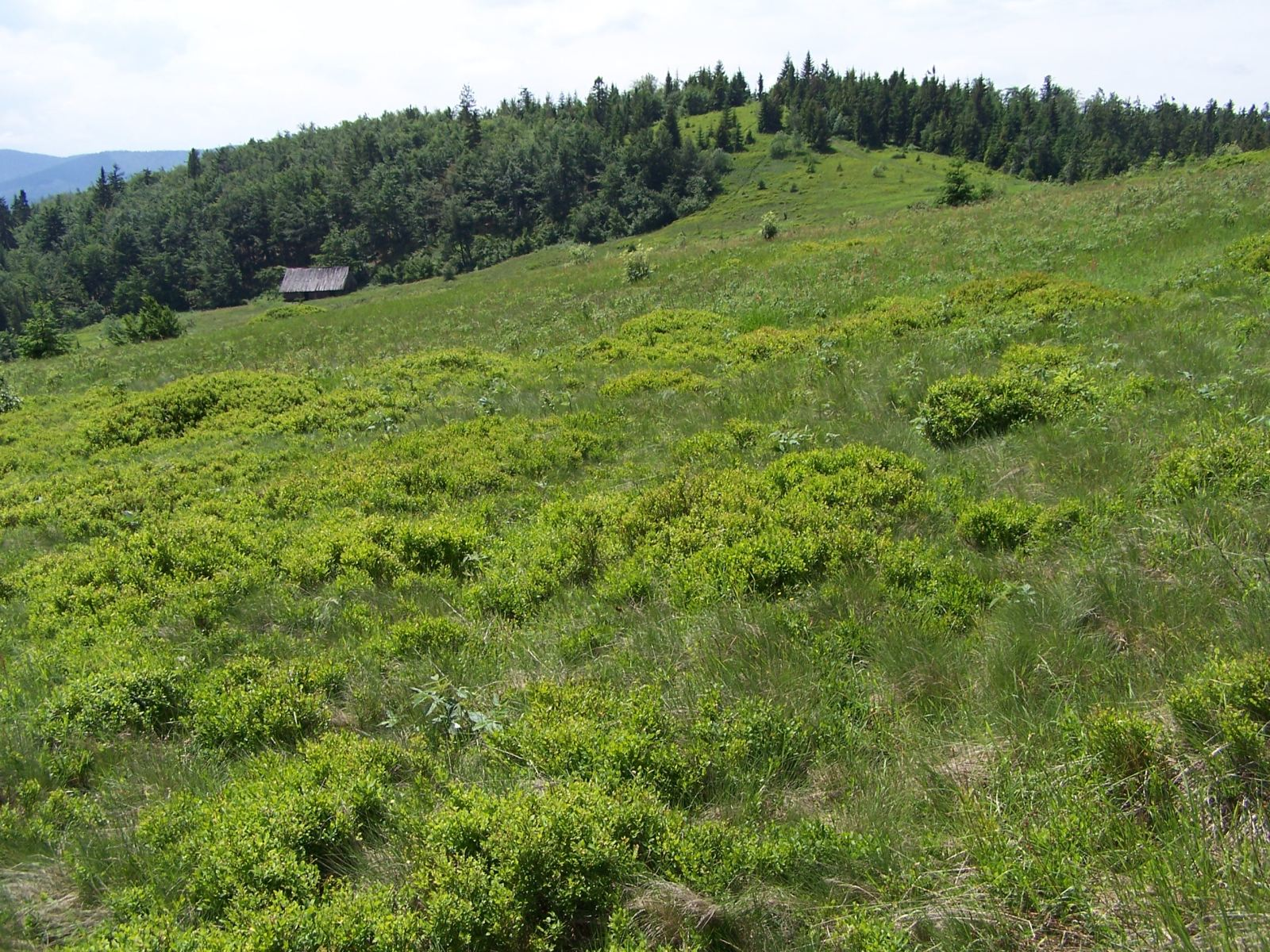 Jasień (Beskid Wyspowy). Polana Skalne